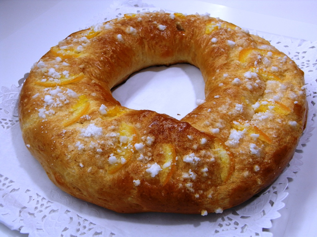 Roscón de Reis caseiro. Galiza